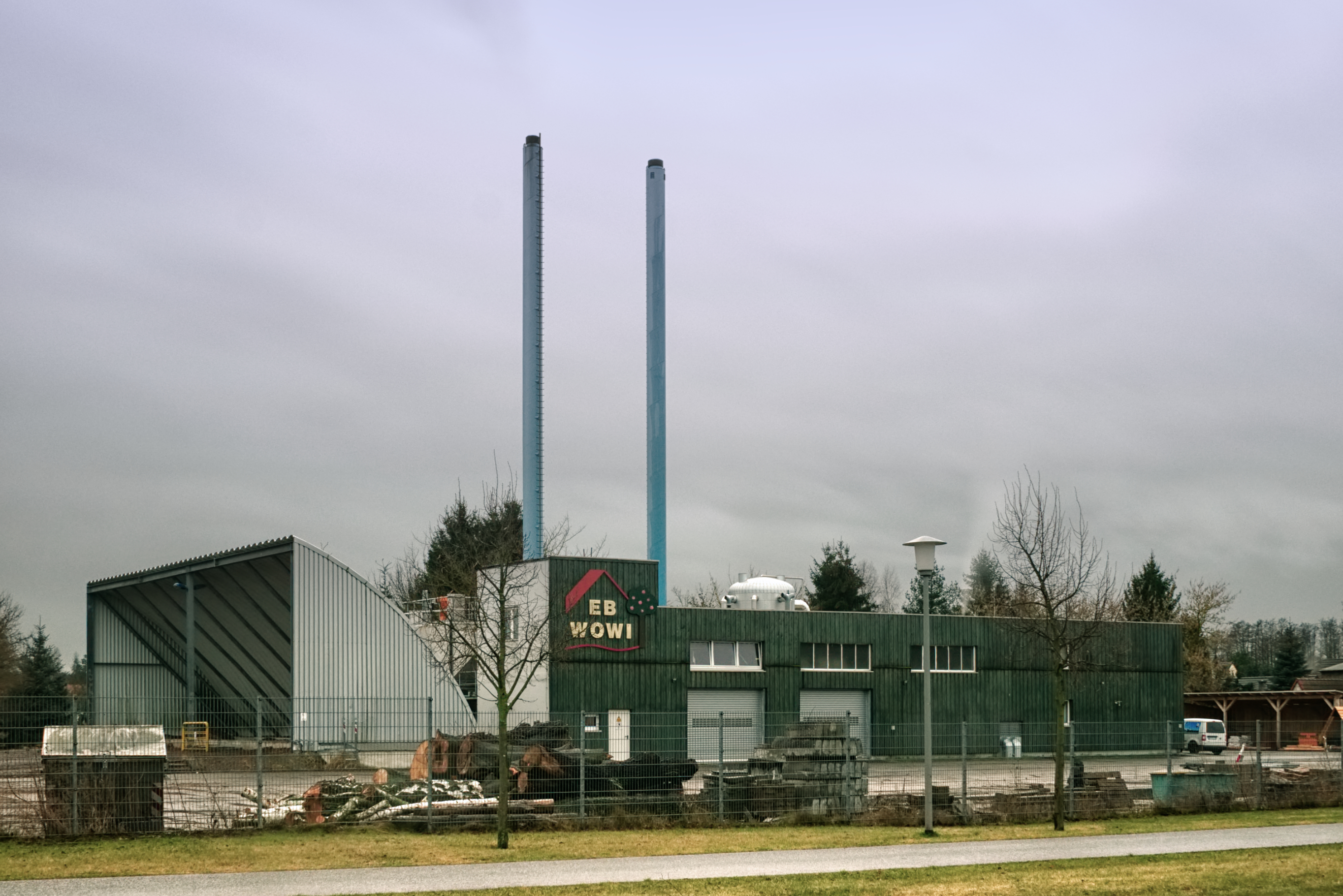 Hackschnitzelheizkraftwerk der EB WOWI in Eggesin